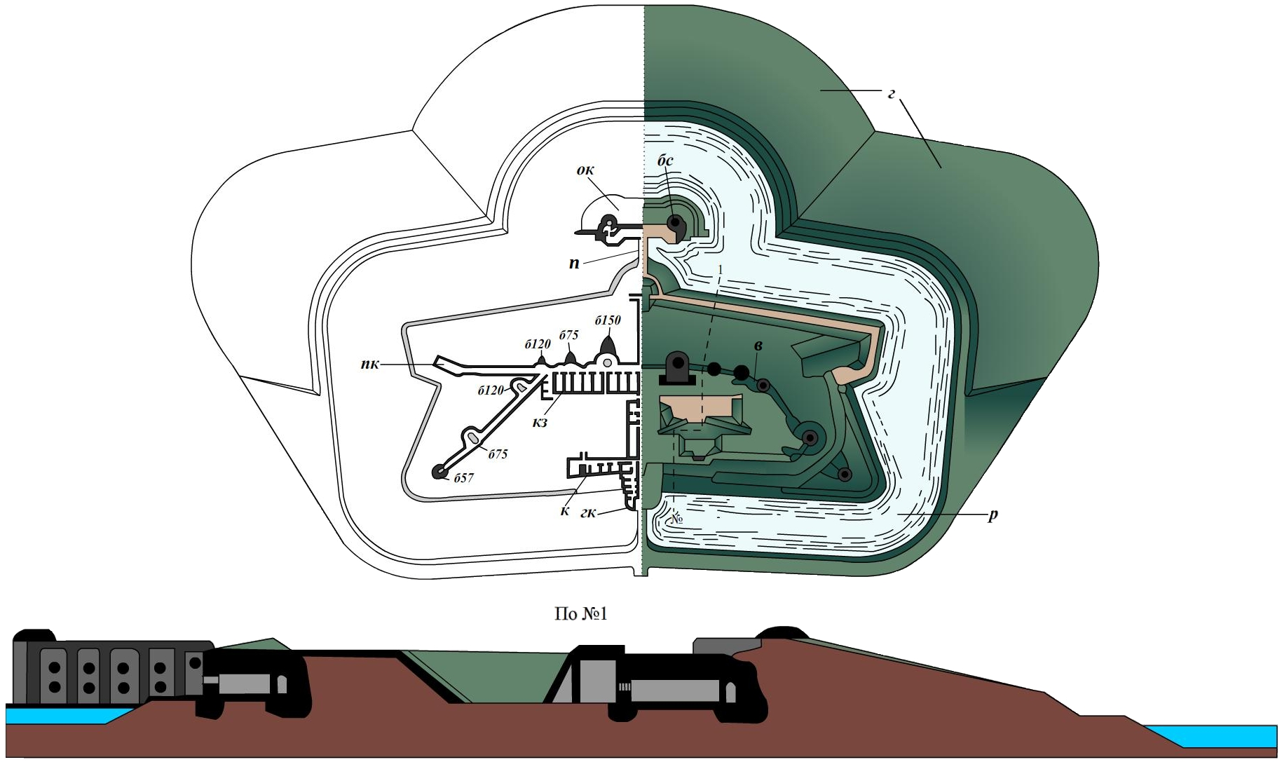 План и разрез антверпенского форта Вавр С.-Катрин. б - бронебашни 4-х типов: 1) б150 - вооружённые 150-мм пушками , 2) б120 - 120-мм гаубицами, 3) б75 - 75-мм пушками и 4) б57 - 57-мм пушками. кз - казематы под валом, которые образовывали головную казарму. в - вал форта, р - водяной ров, г - земляной гласис, ок - островной (головной) капонир, п - плотина для сообщения с капониром, бс -бронебашни со скорострелками, пк - плечевые полукапониры, гк - горжевой капонир, к - горжевая казарма.